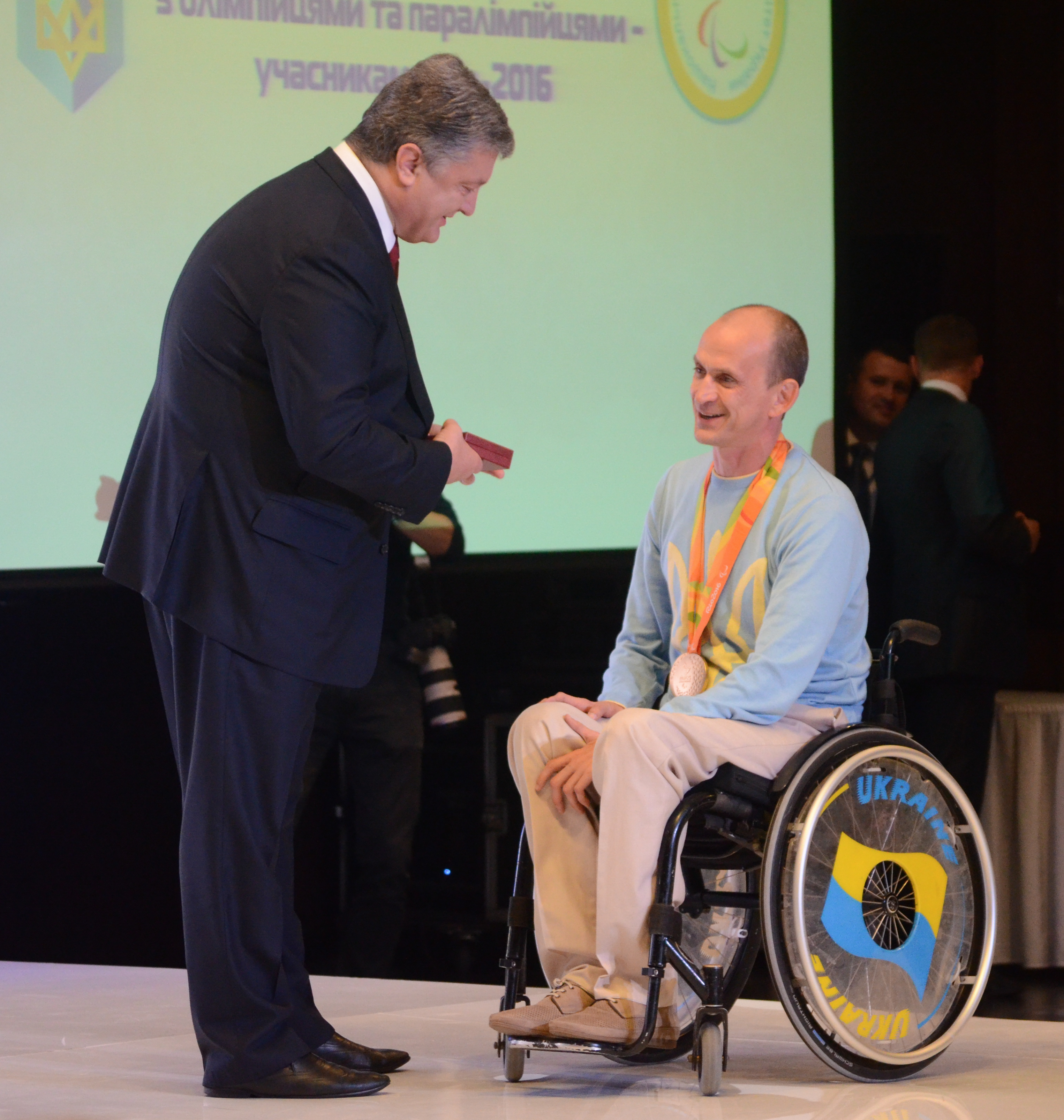 Зустріч Президента України з олімпійцями та паралімпійцями — учасниками Ріо-2016.